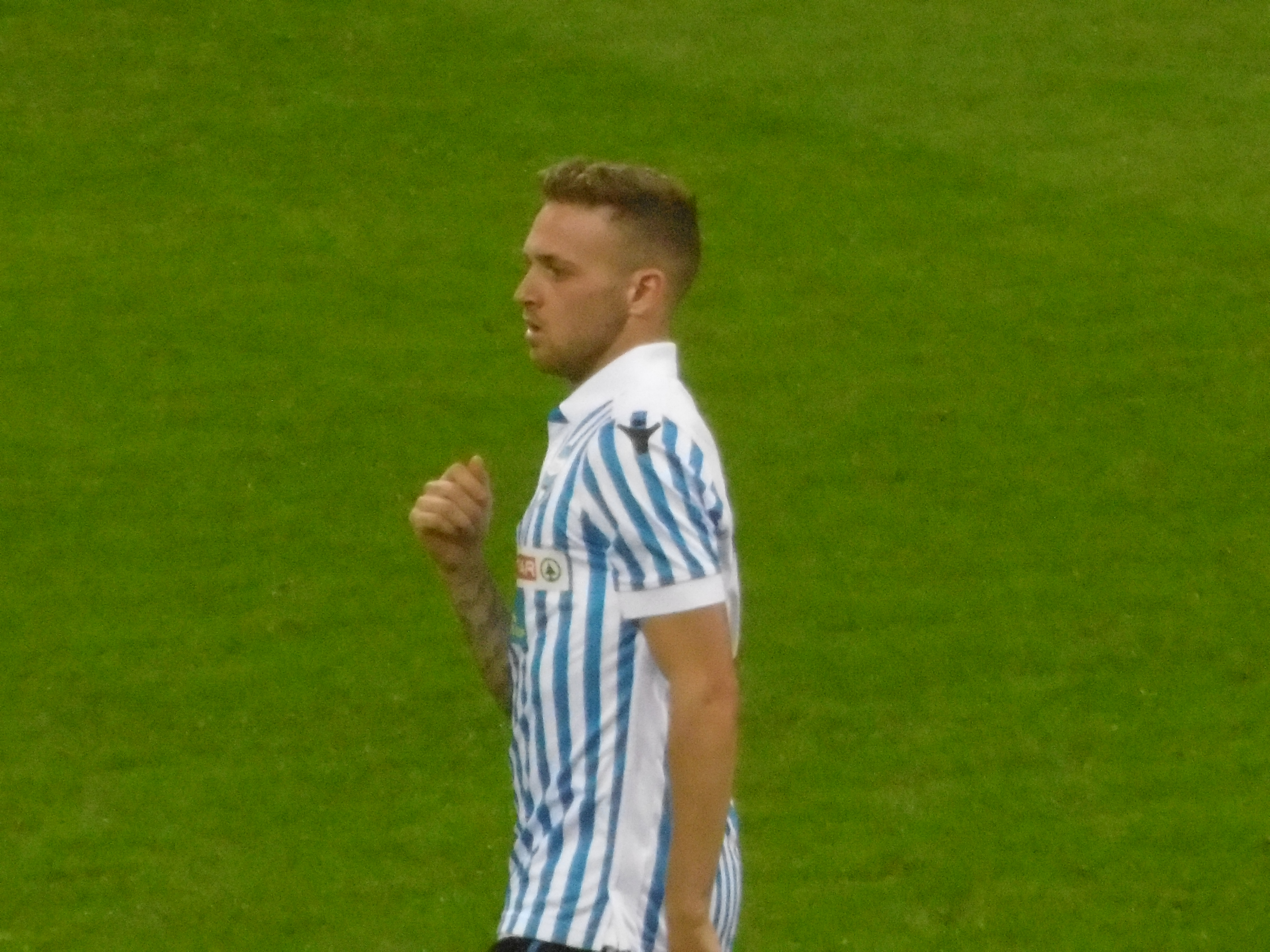 Manuel Lazzari nella partita Milan - Spal del 20 settembre 2017, Stadio Meazza (Milano)